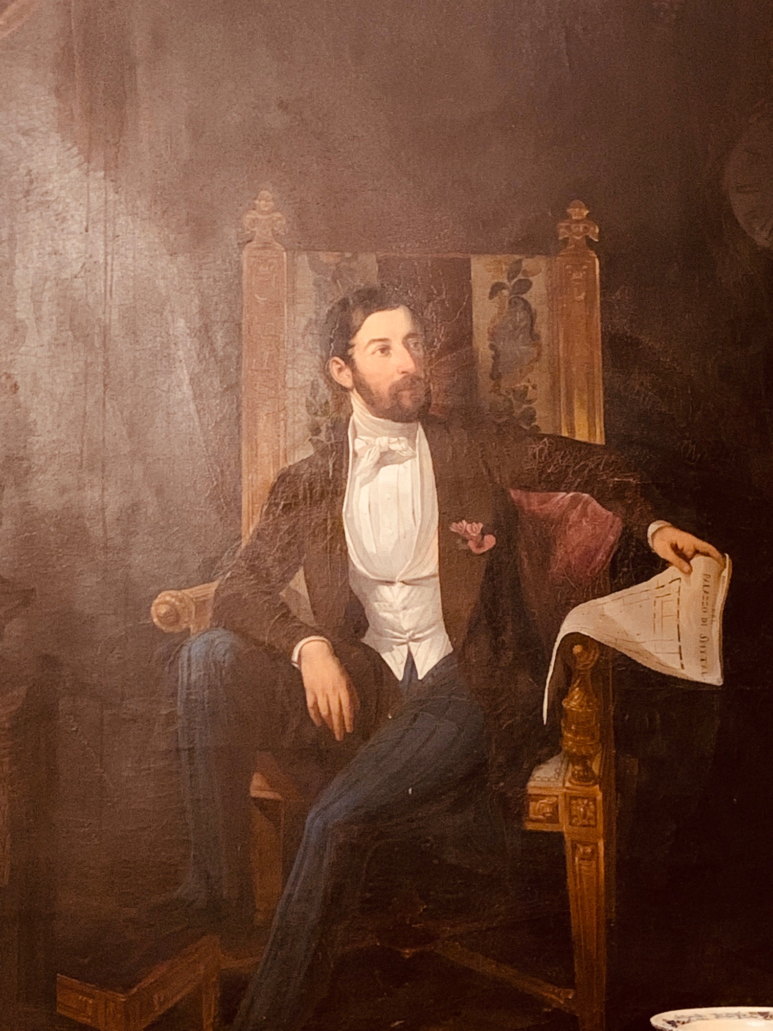 Il quadro rappresenta Alfonso Gabriele X° principe di Porcia e Brugnera